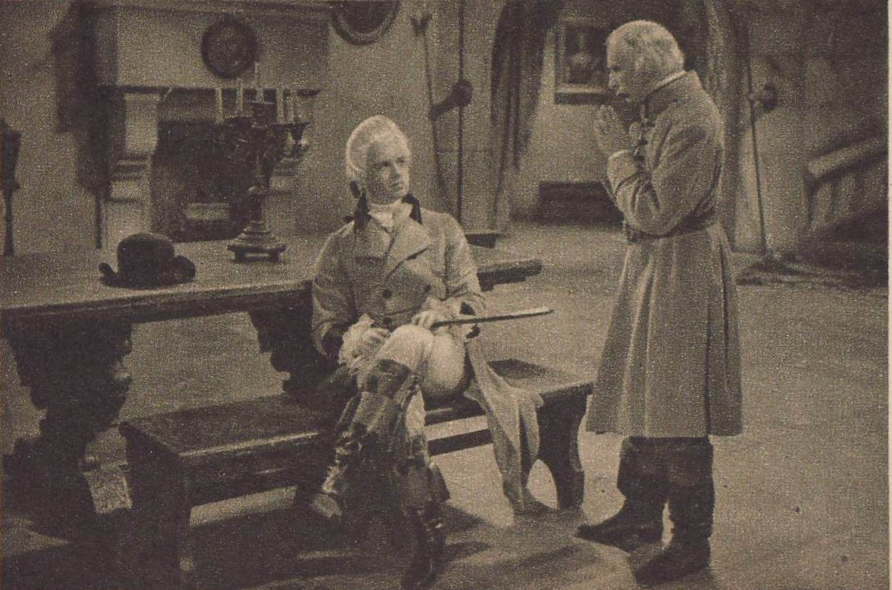 Witold Zacharewicz w filmie "Halka"